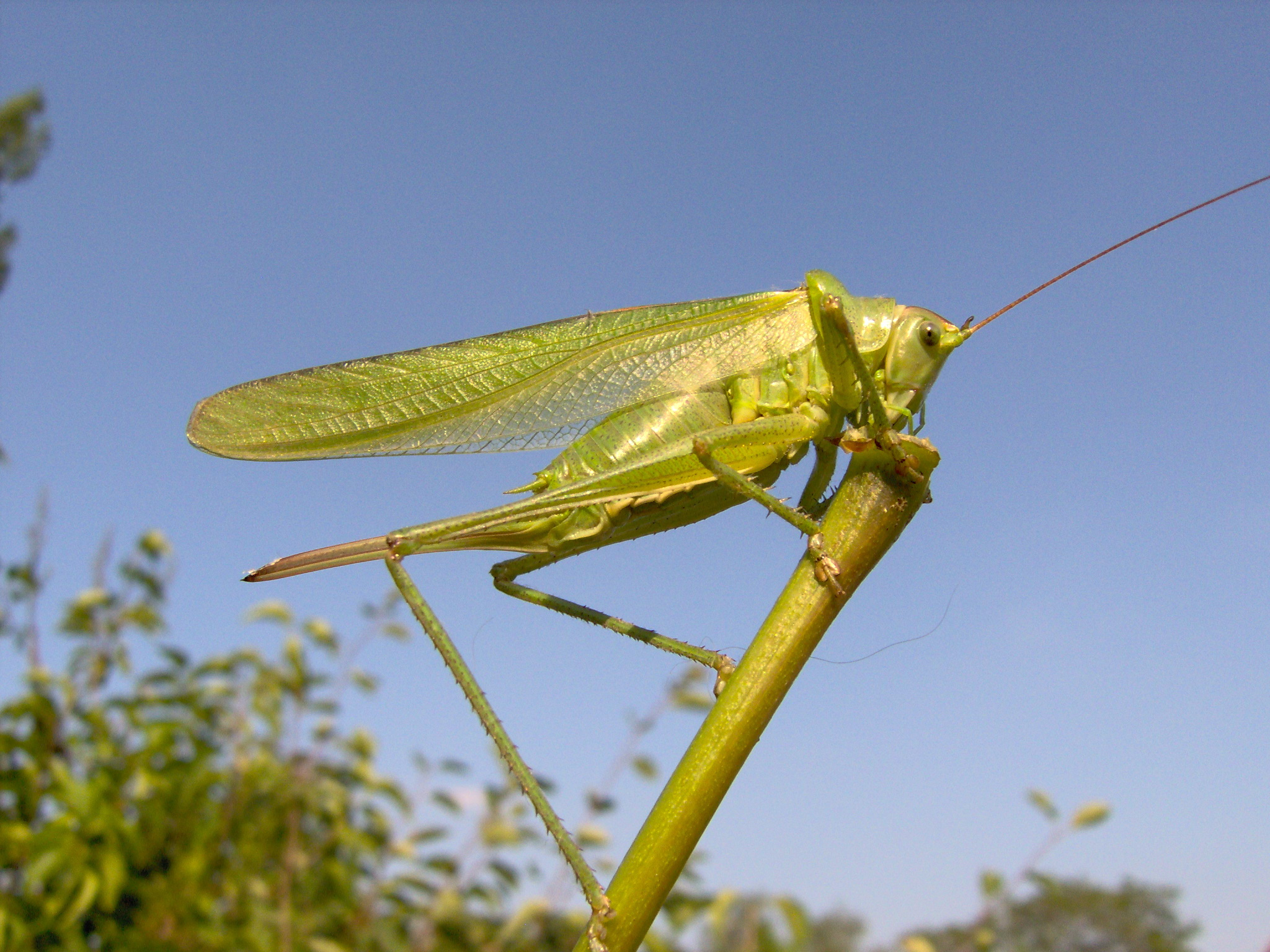 Heupferd an Rebenstaengel beim Fressen